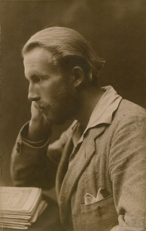 Butkų Juzė (tikroji pavardė Juozas Butkus; 1893 m. liepos 21 d., senuoju stiliumi liepos 9 d. Pažvelsyje, Kulių valsčius, Telšių apskritis – 1947 m. balandžio 22 d. Klaipėdoje) – Lietuvos pedagogas, poetas, dramaturgas, žurnalistas.